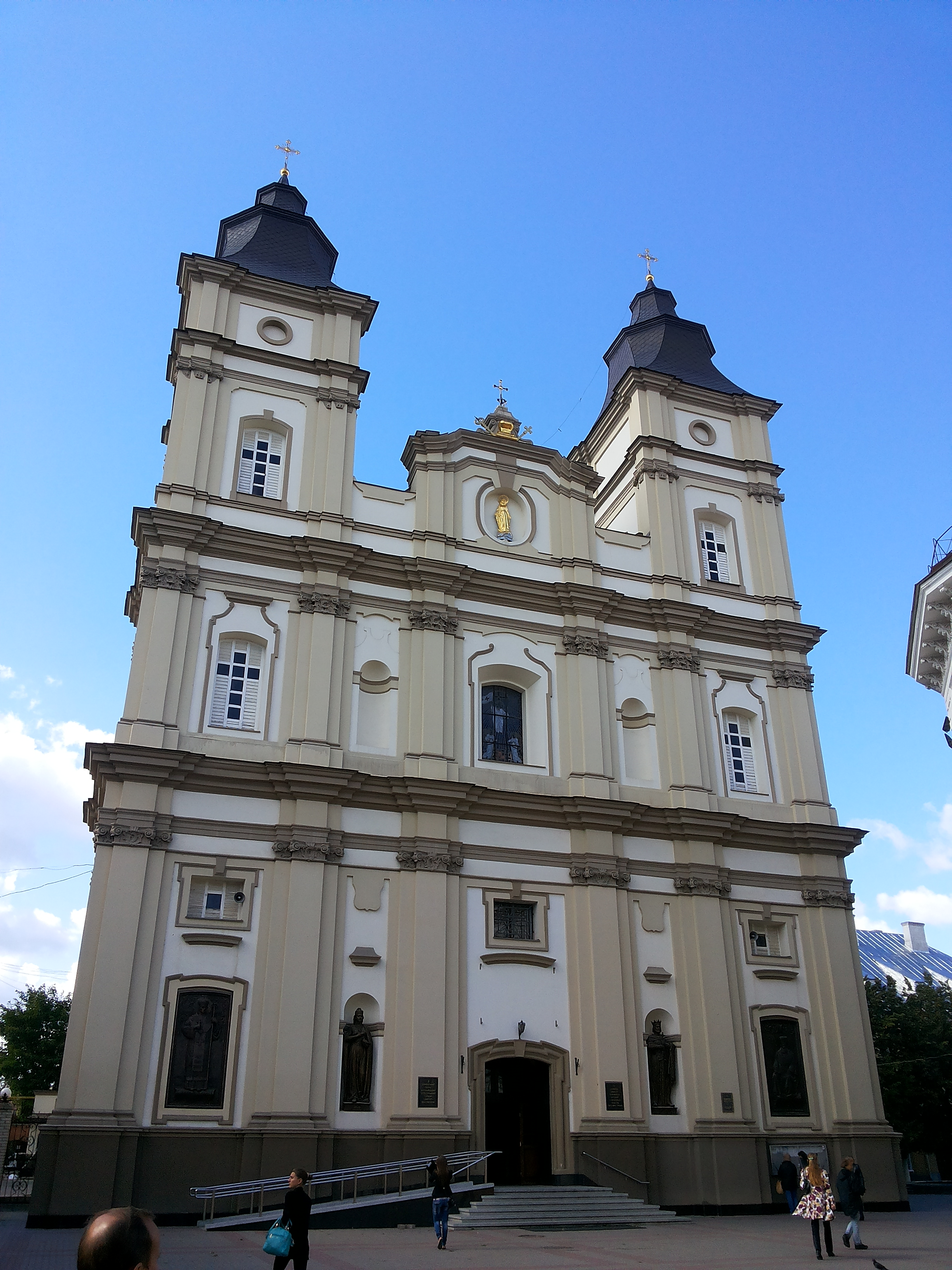 Костел Єзуїтів (Собор Святого Воскресіння), Івано-Франківськ, Майдан Шептицького, 22